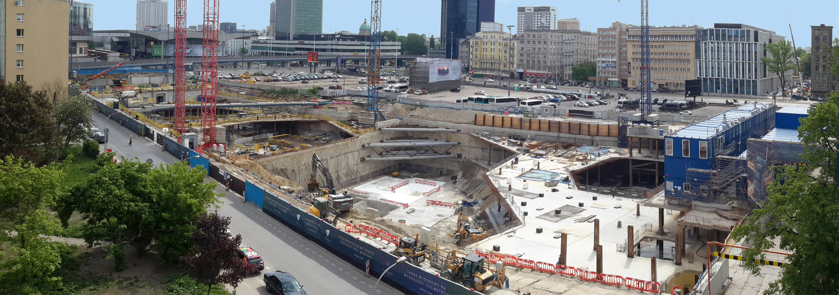 Budowa Varso - panorama 1 maja 2018